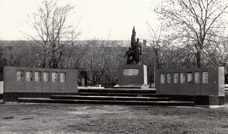 Памятник на братской могиле хутора Весёлый Веселовского района Ростовской области, 1980-е годы